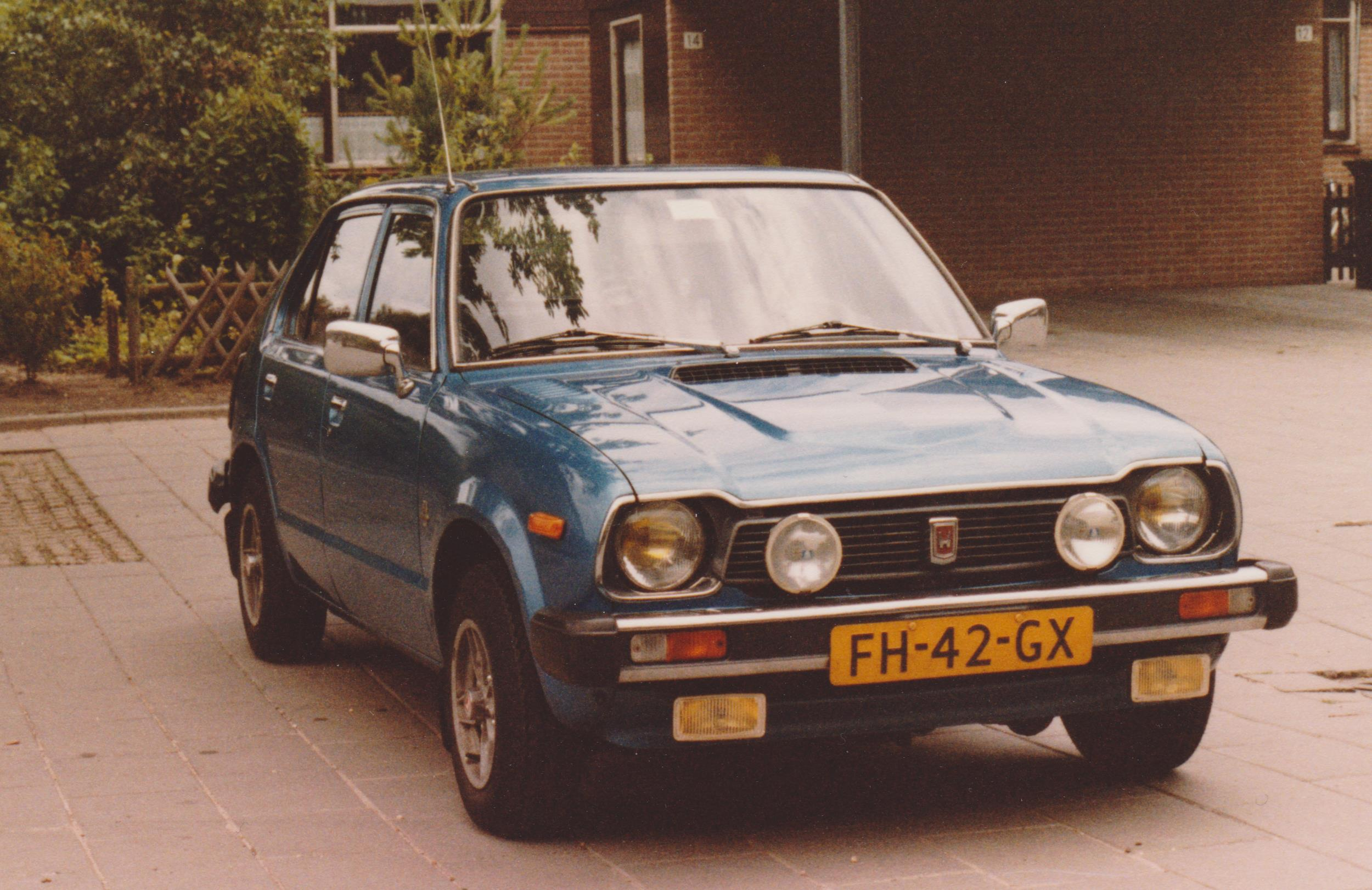 Honda Civic, 1e generatie, gekocht oktober 1979.